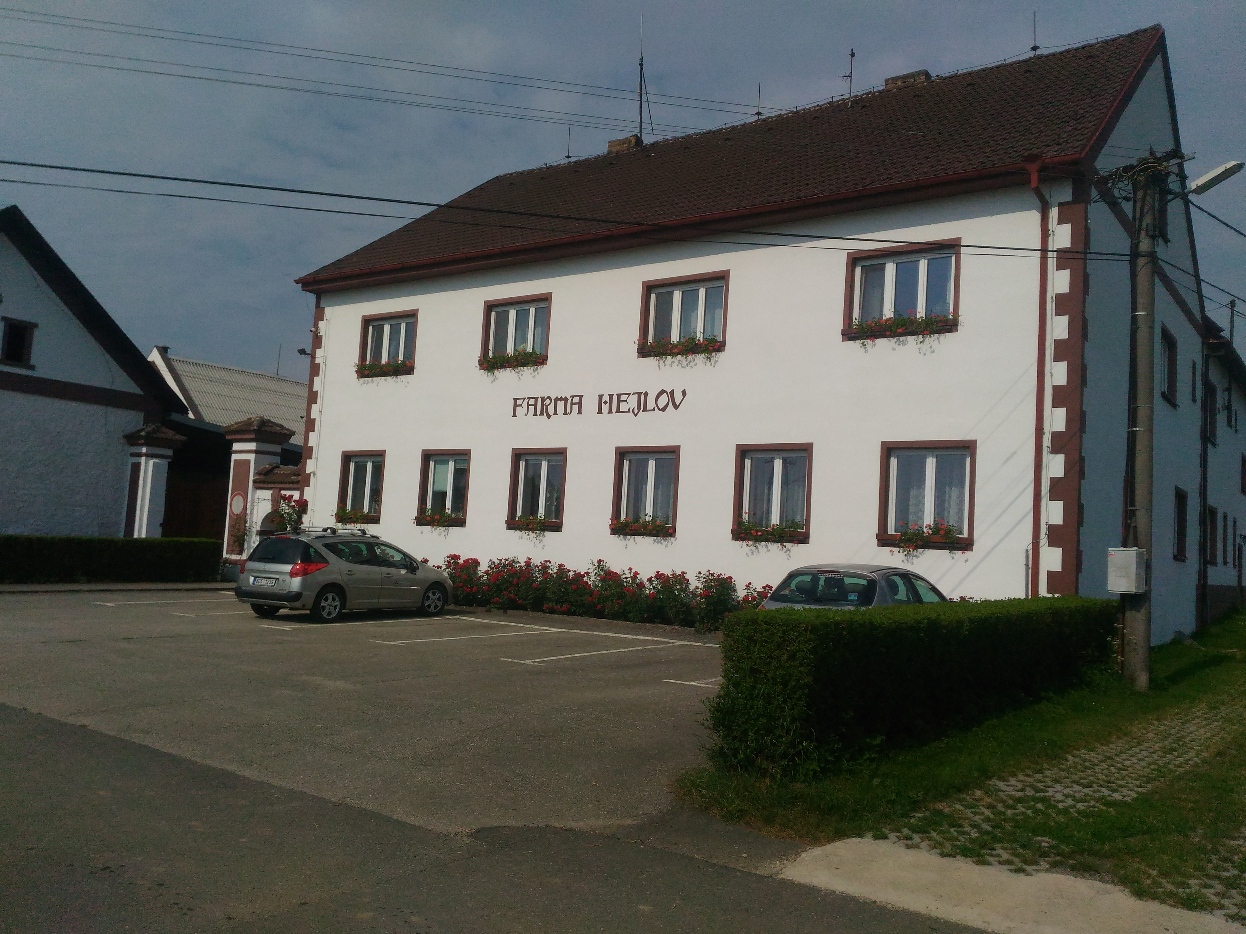 Hejlov, okres Tábor, Česká republika